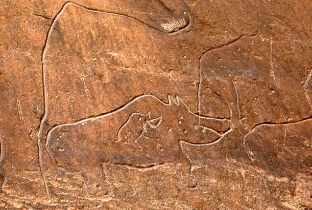 Gravures préhistoriques de la région d'El Bayadh, Algérie